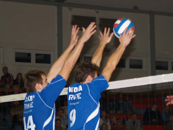 Brněnský blok v extraligovém zápase proti Ostravě